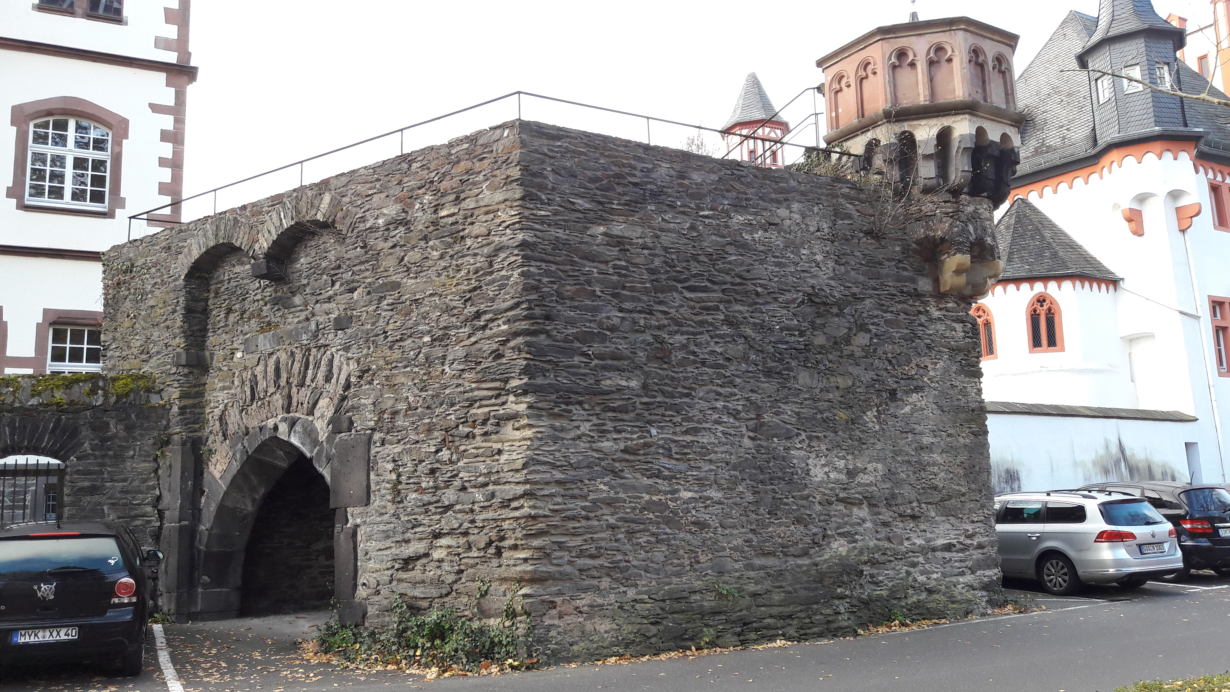 Sandtor der mittelalterlichen Stadtbefestigung von Boppard